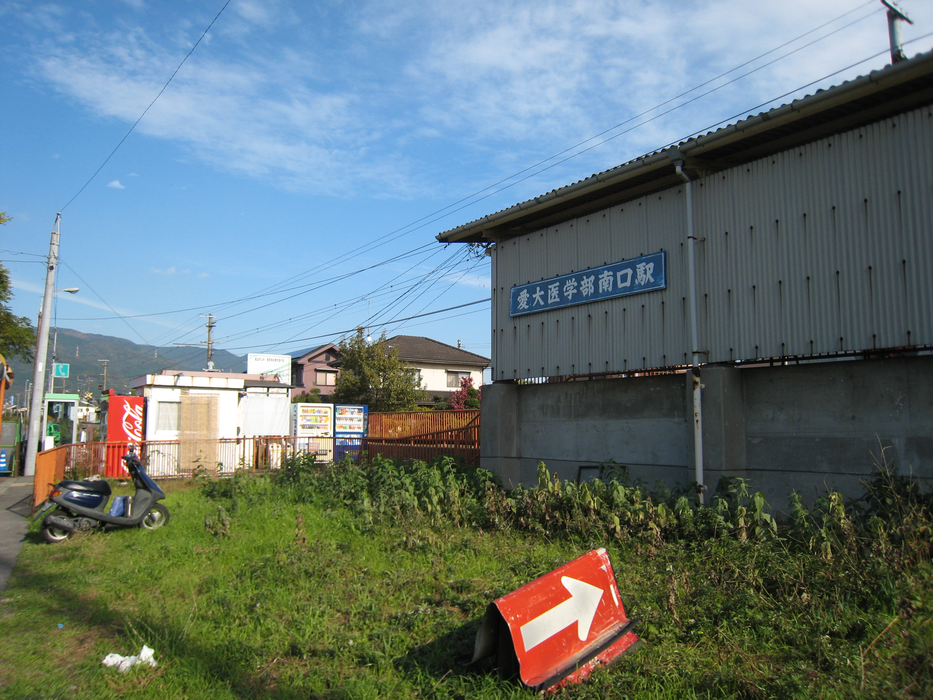 伊予鉄道 愛大医学部南口駅